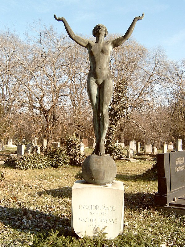 Pásztor János sírja Budapesten. Kerepesi temető: 33-1-1 (saját műve), A szobor a 'Sic itur ad astra' (Így jutni a csillagokig) 1928-ban készült szobor másolata [1], [2]